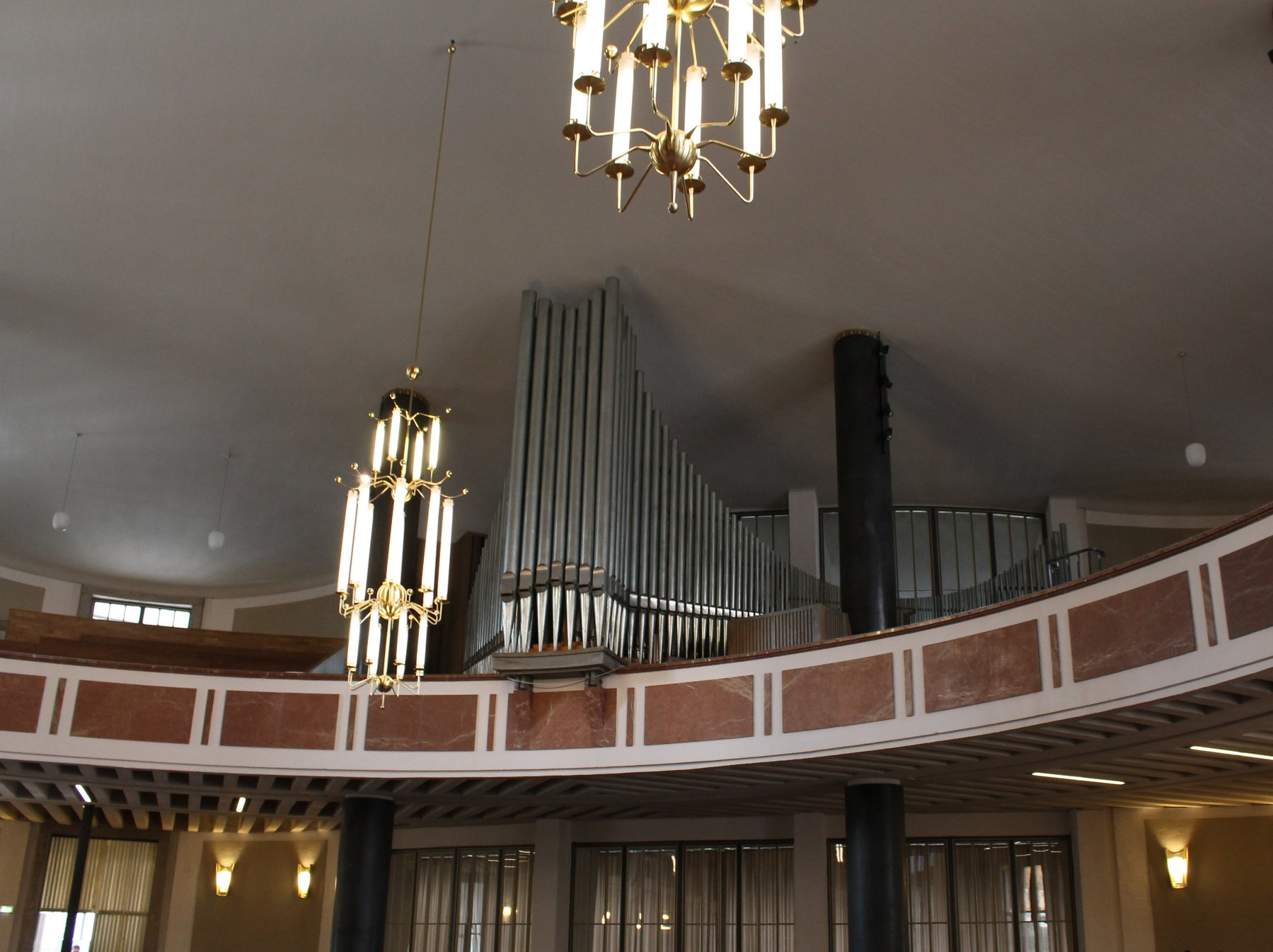 Orgel von St. Matthäus in München (1963, Steinmeyer, IV/65)